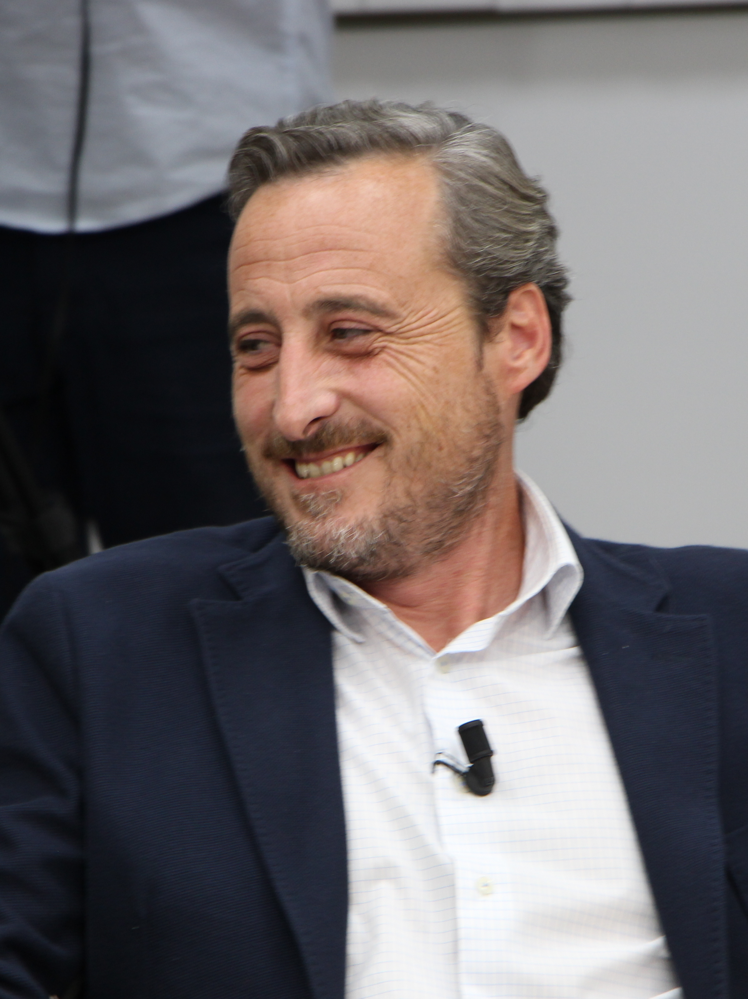 Encuentro Actuall - Moderado y presentado por Alfonso Basallo Director del Periódico Actuall. Invitados: Isabel San Sebastián, periodista de ABC Kiko Méndez, columnista de Intereconomía Luis Losada, periodista Carlos Gredilla, españoles de a pie Ignacio Arsuaga, presidente de